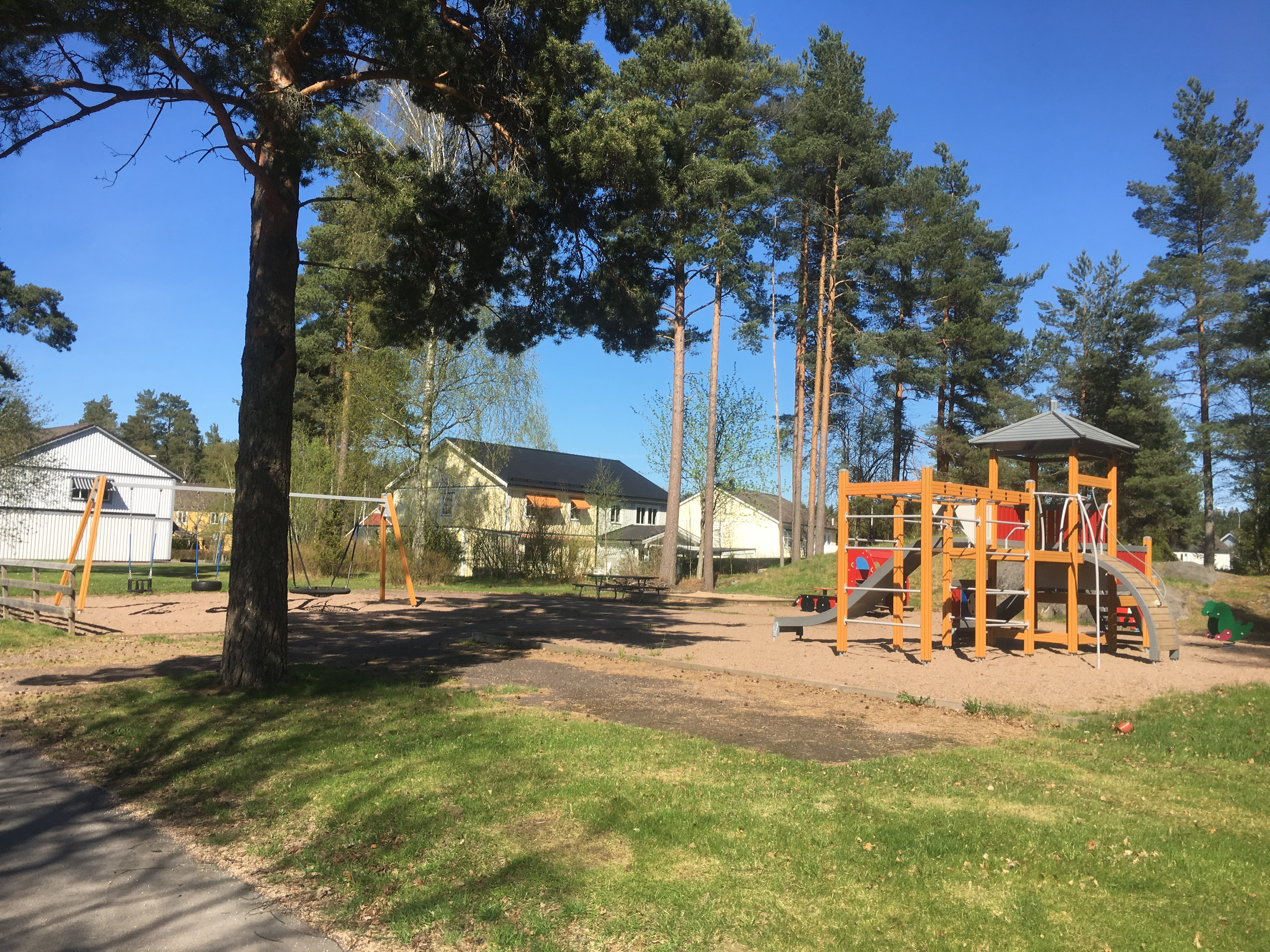 En av flera lekparker på området